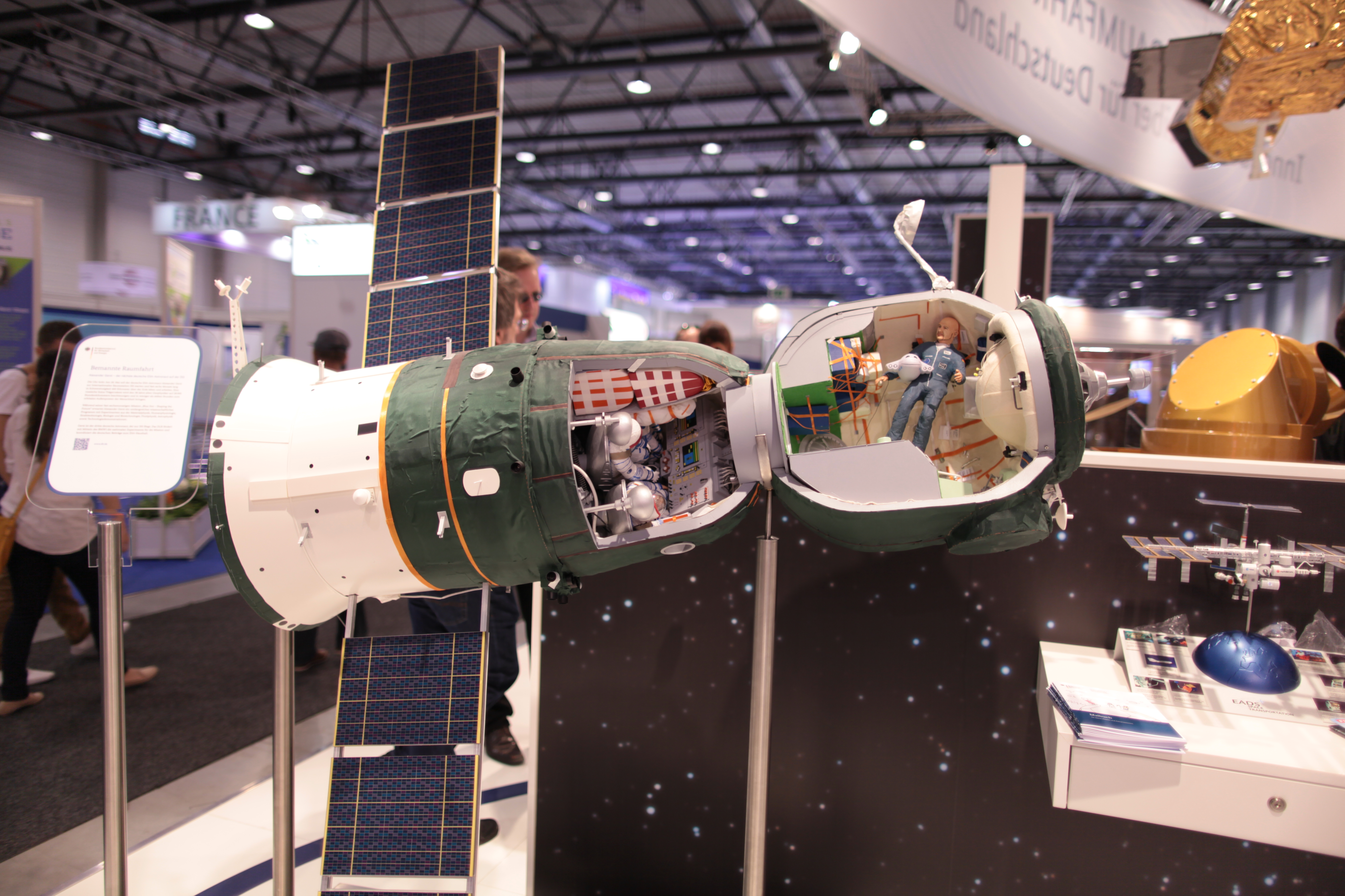 Eine Alexander Gerst Figur am BMWi Stand auf der ILA An Alexander Gerst figure on display at the BMWi stand at ILA